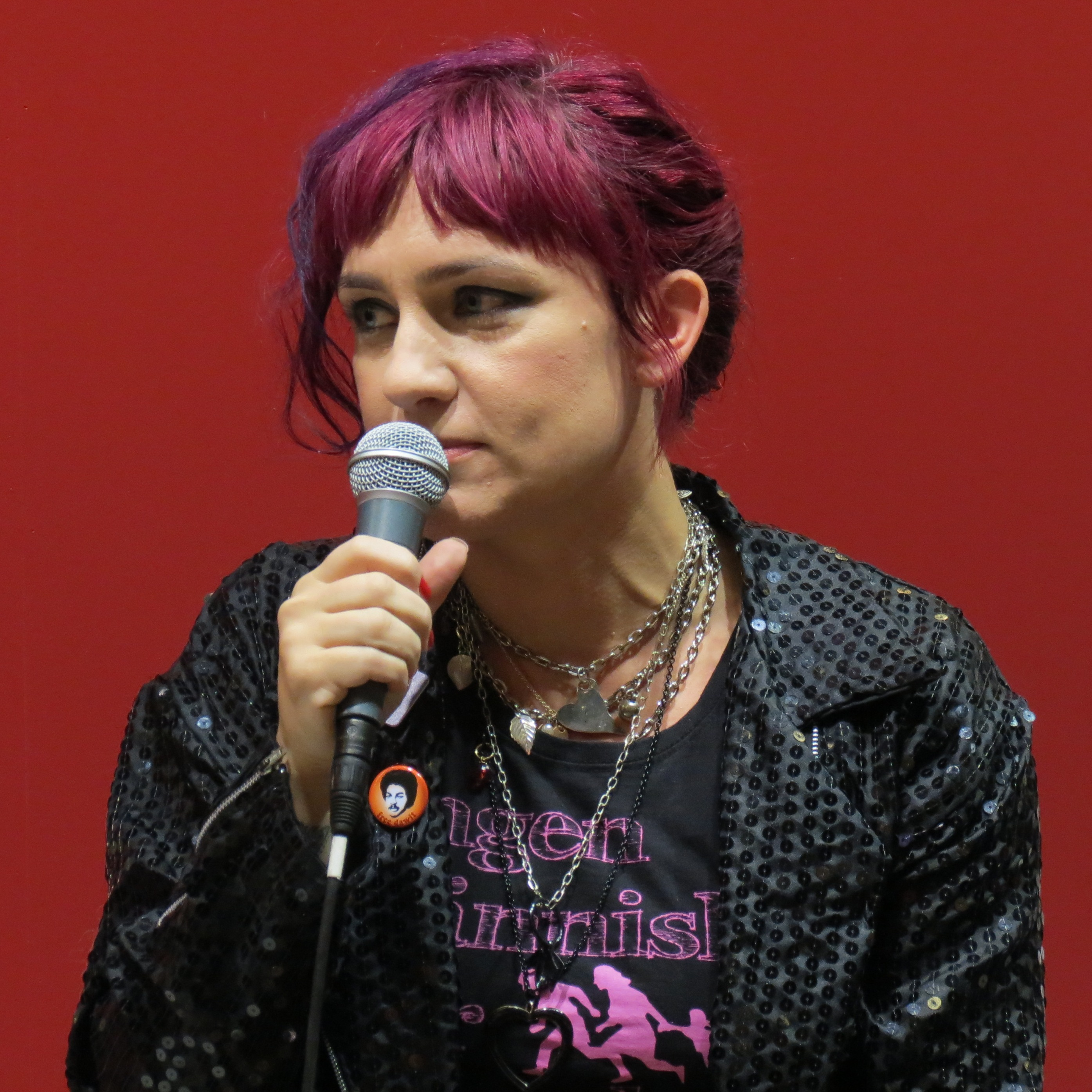 Författaren Anna Jörgensdotter på Bokmässan i Göteborg 2015.